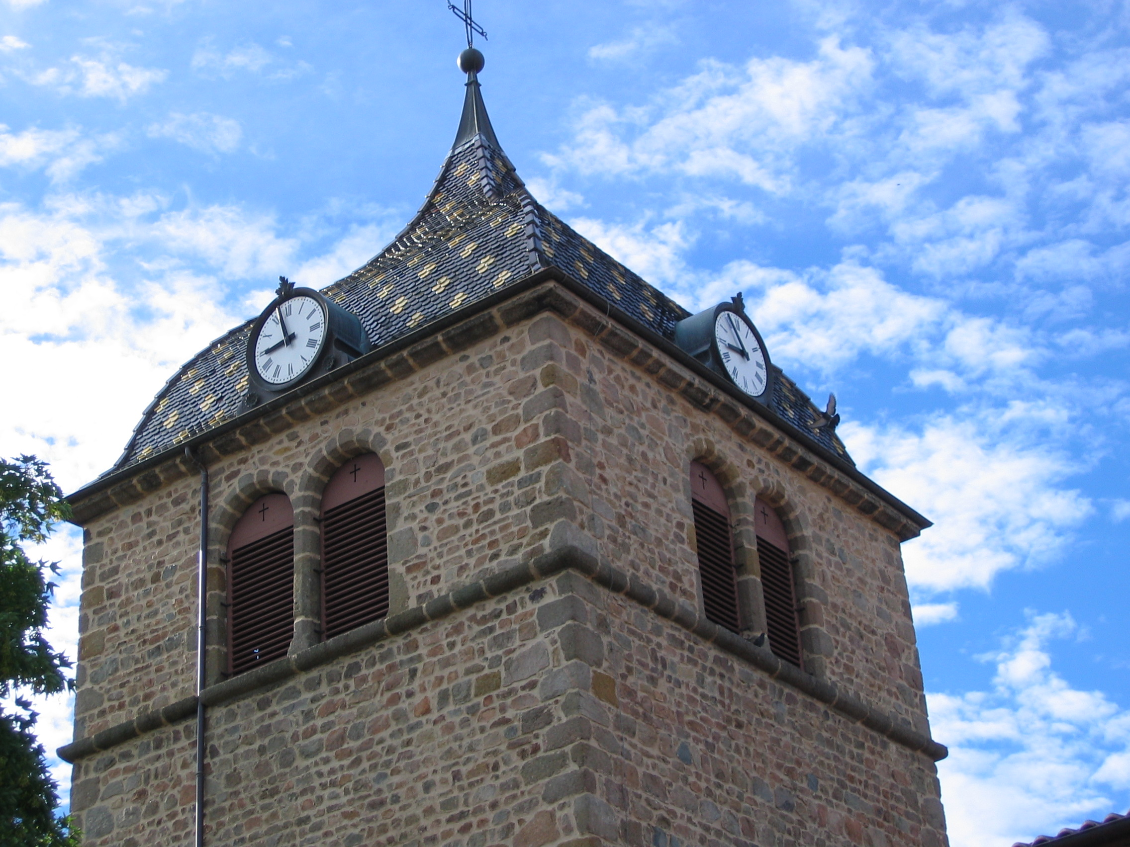 Le Clocher de Longessaigne (Rhône)